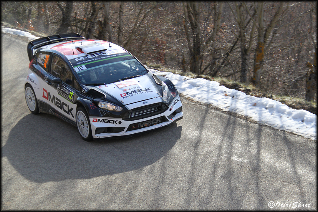 Rajd Monter Carlo 2016 Ott Tänak 3 OS